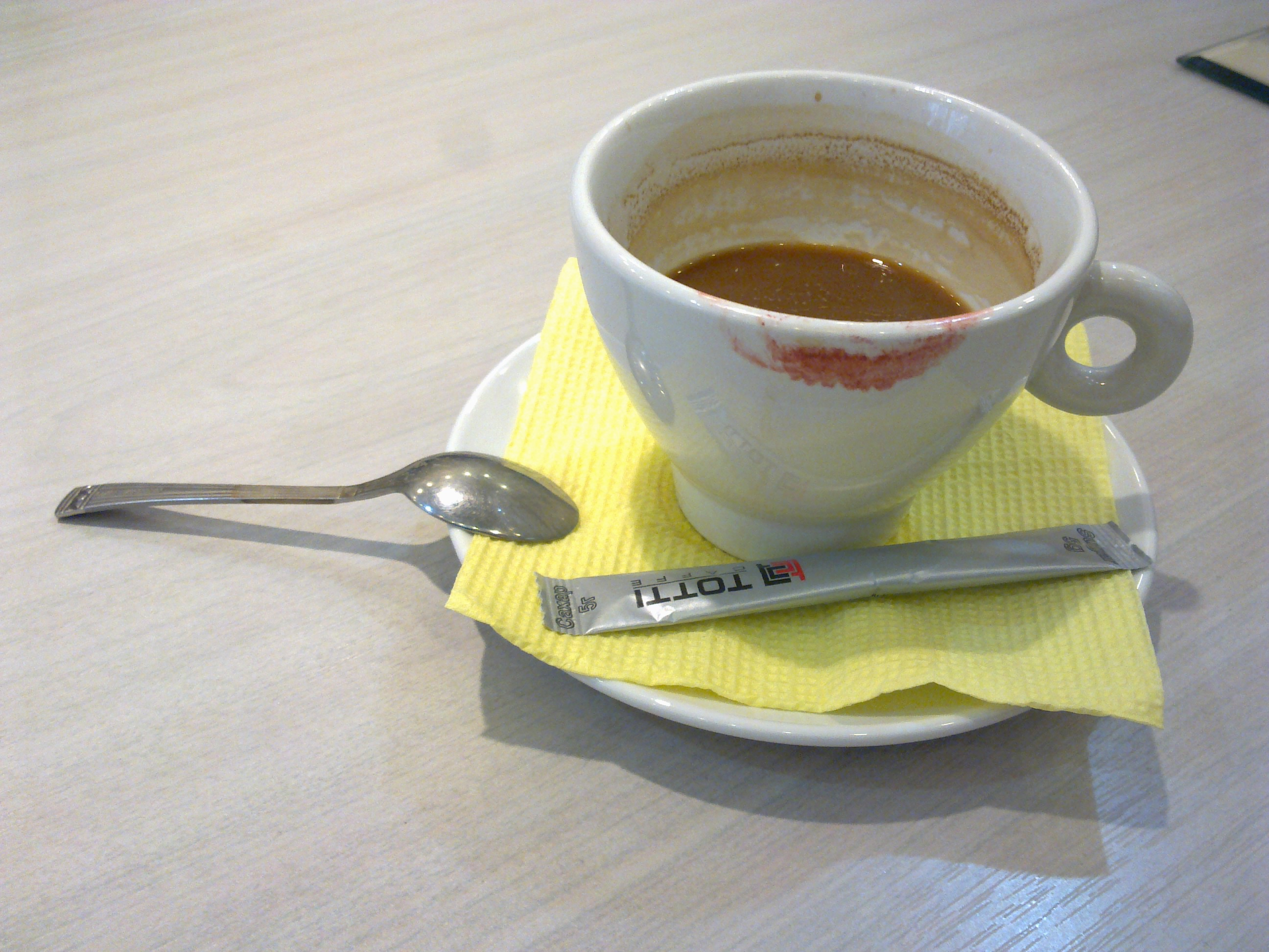 Сліди помади